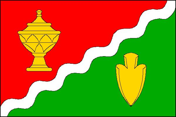 Vlajka obce Jeřice